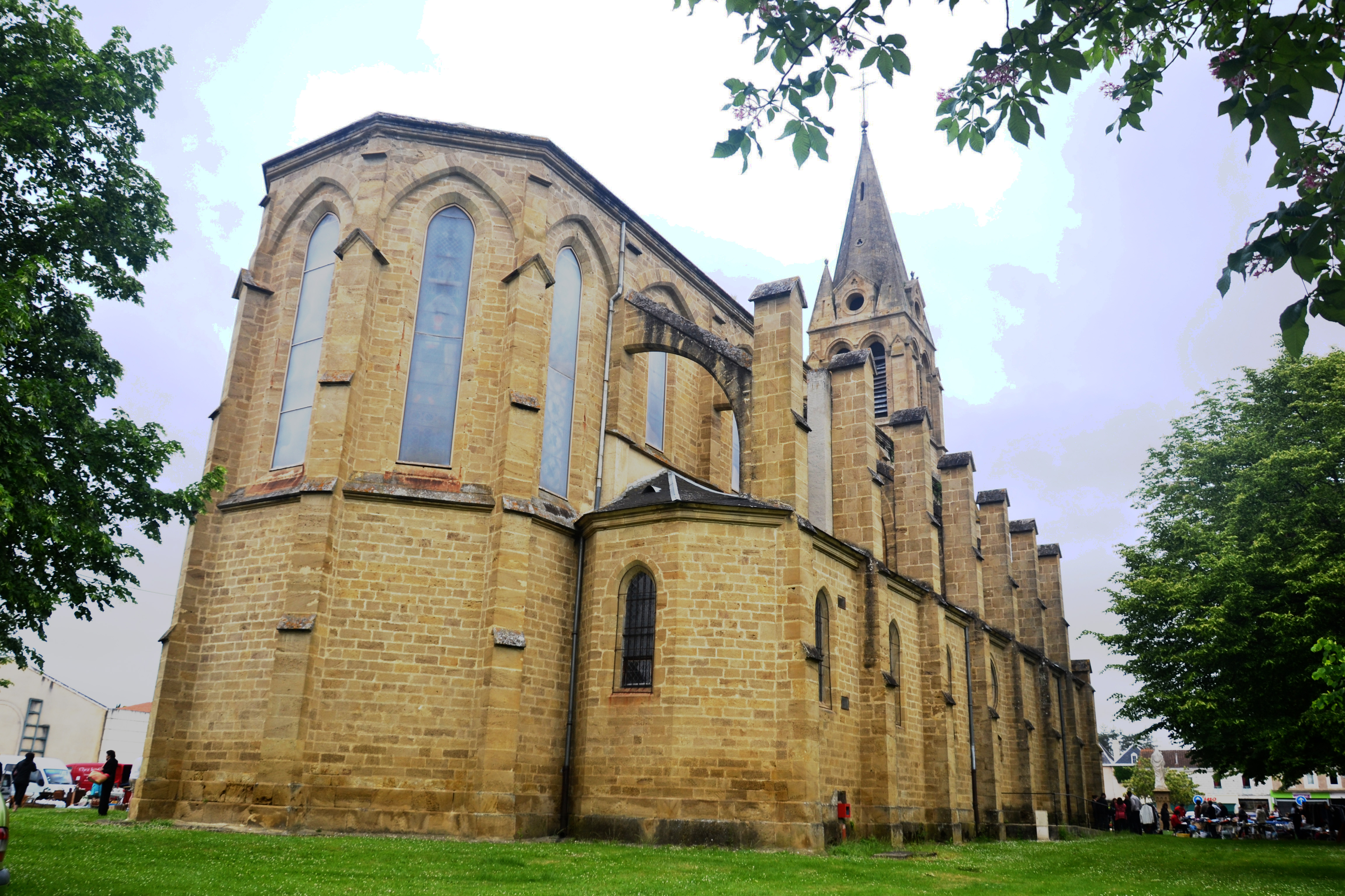 église Notre Dame abside